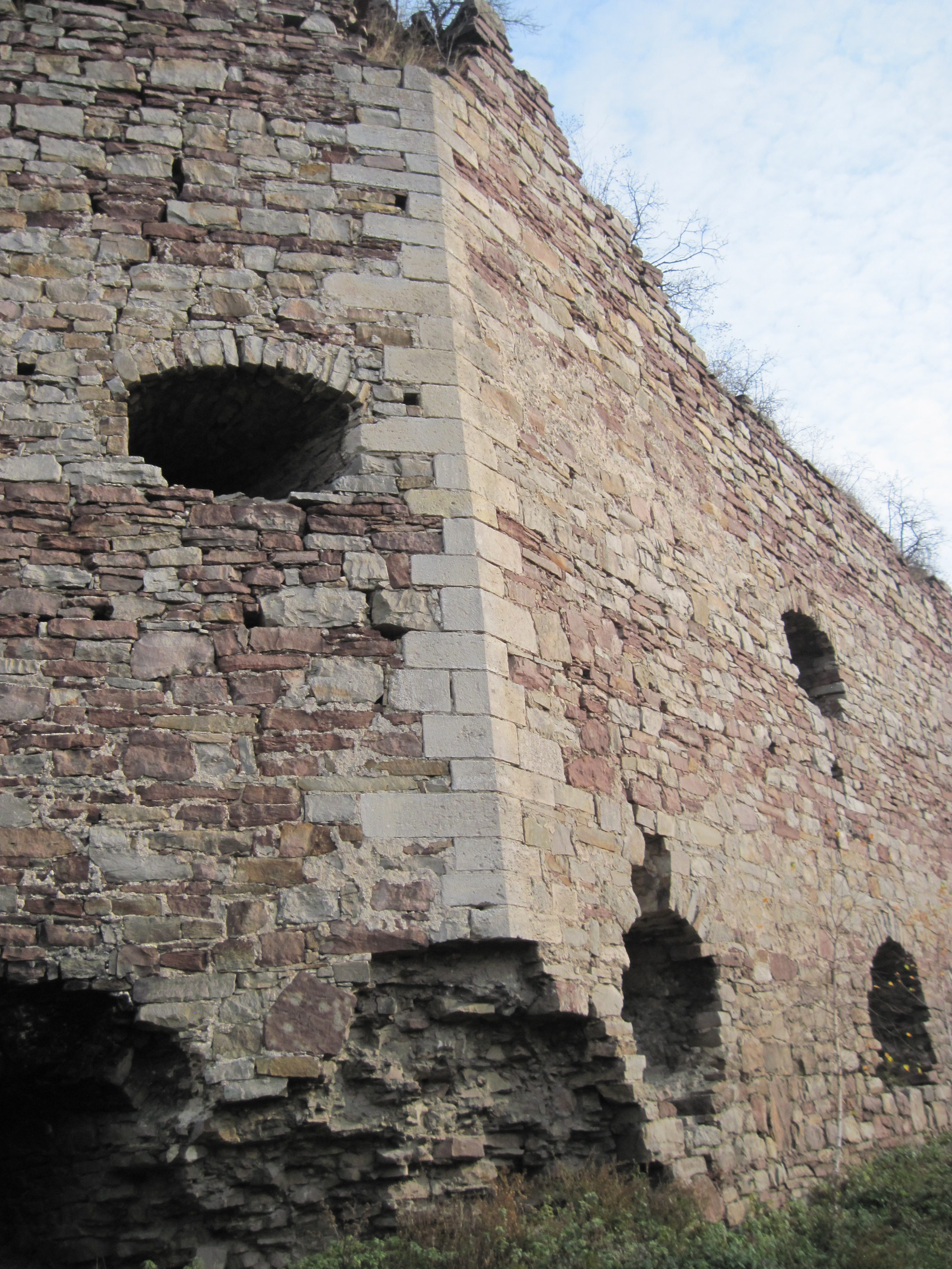 Кут стін, осінь 2013